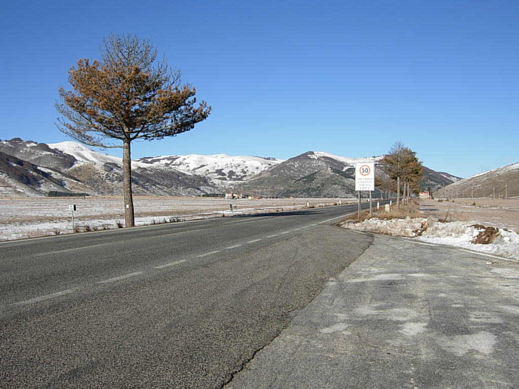 Strada statale 17 in provincia de L'Aquila Foto personale